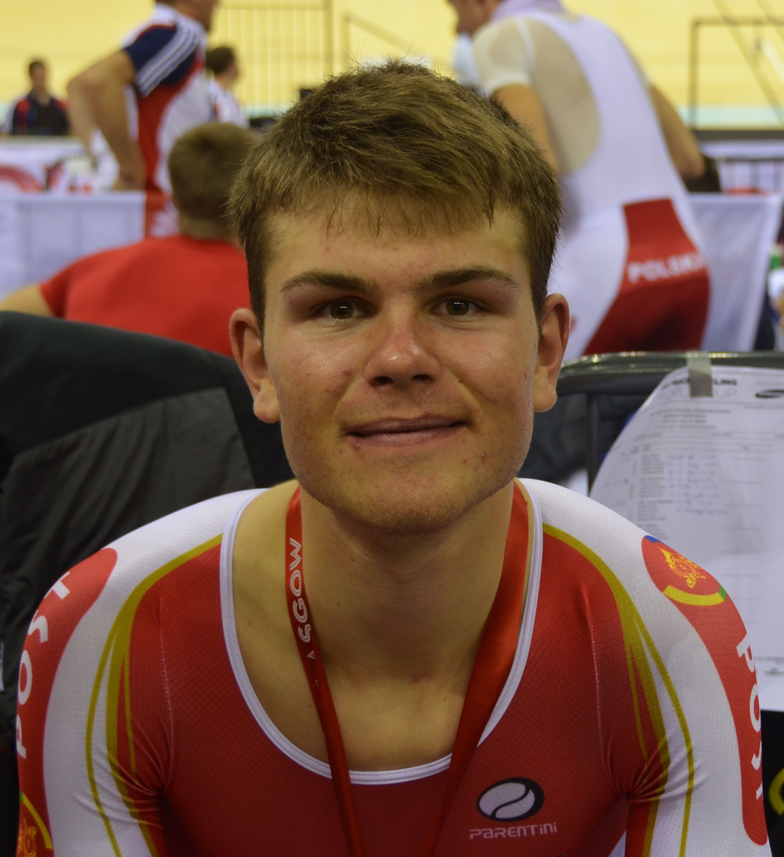 Mathias Møller Nielsen, dänischer Radsportler